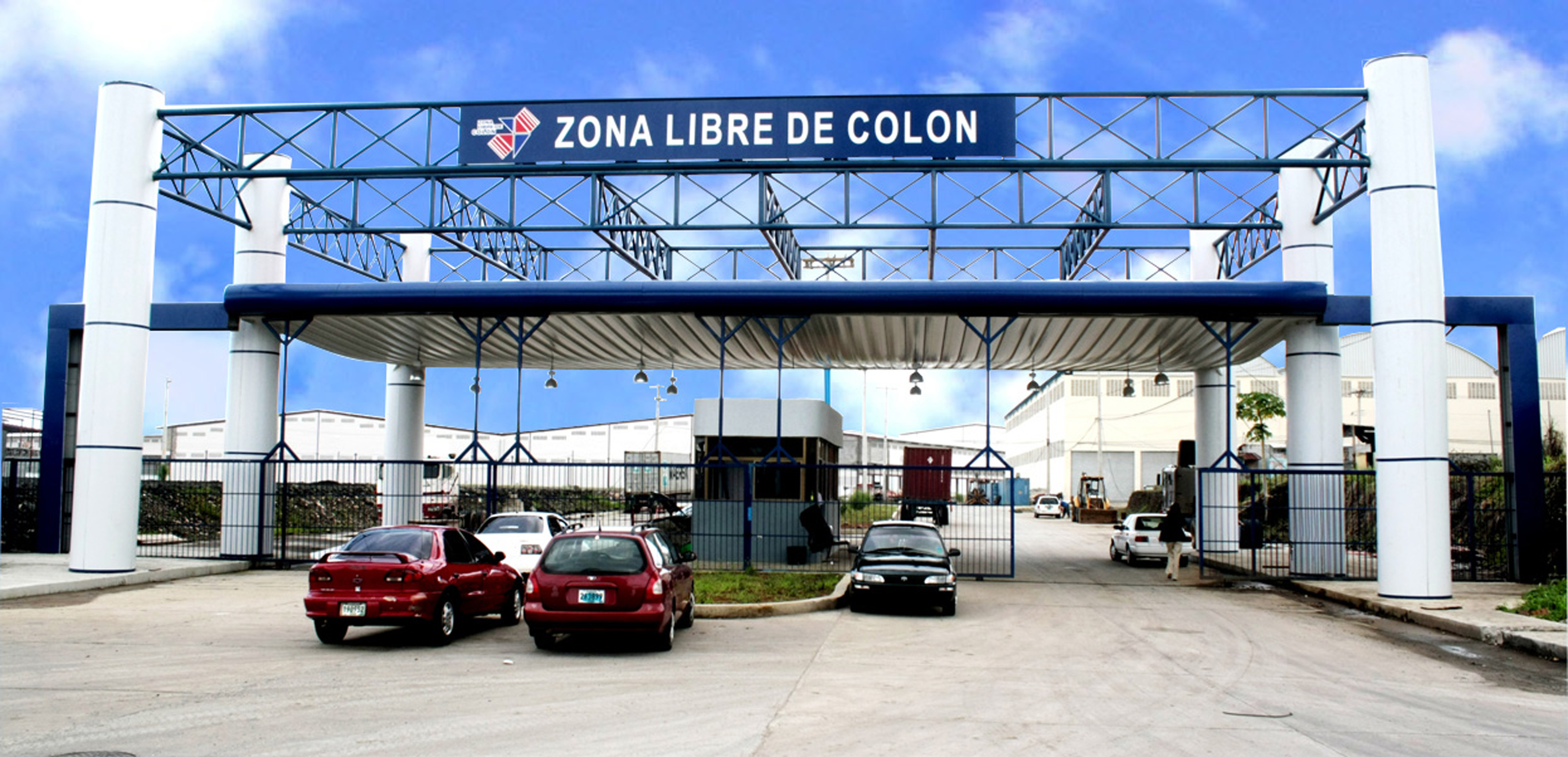 Zona Libre de Colón - Colón Free Trade Zone